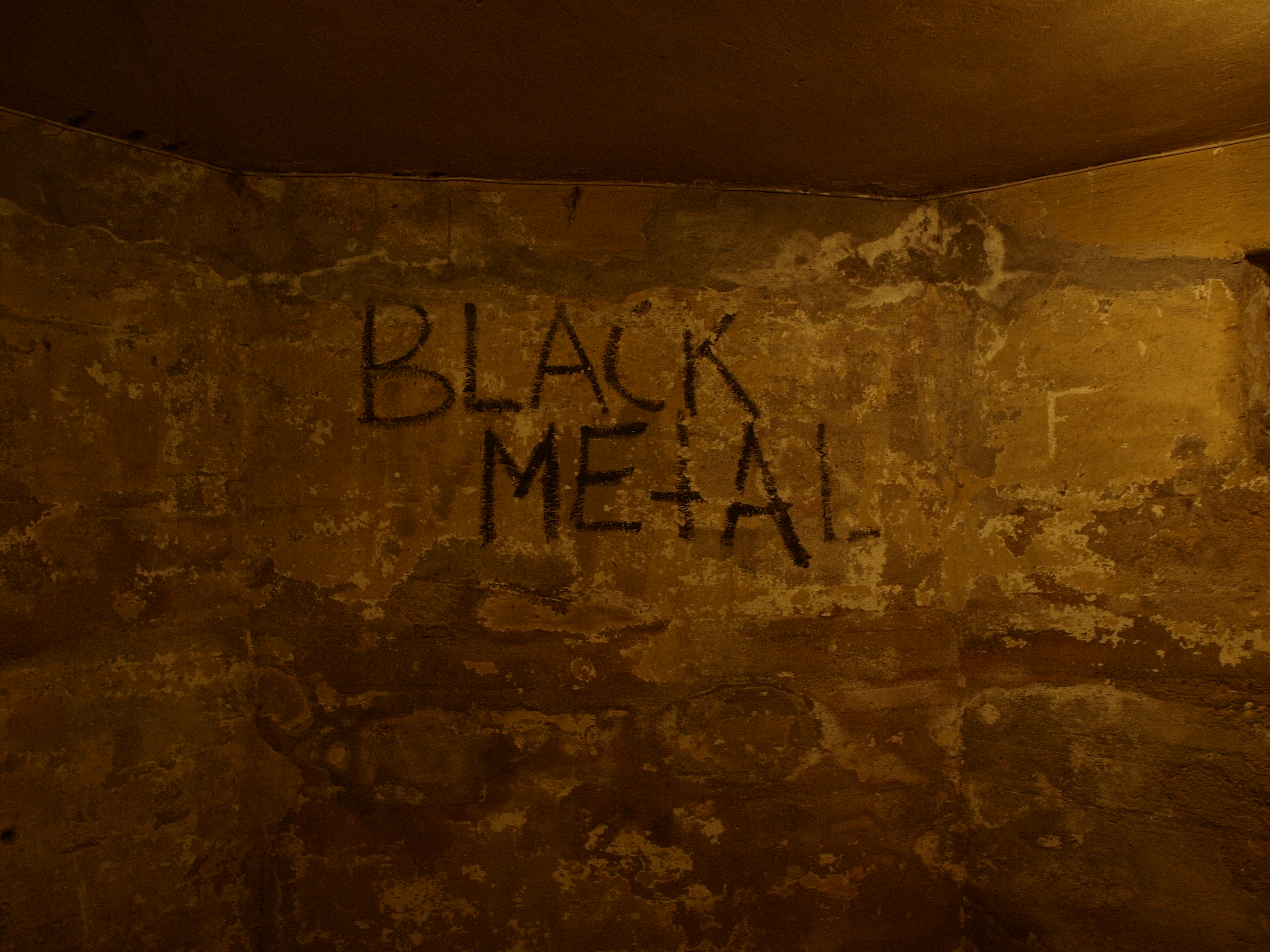 Graffiti realizado en el bajo de la tienda Helvete, propiedad del músico noruego Euronymous.